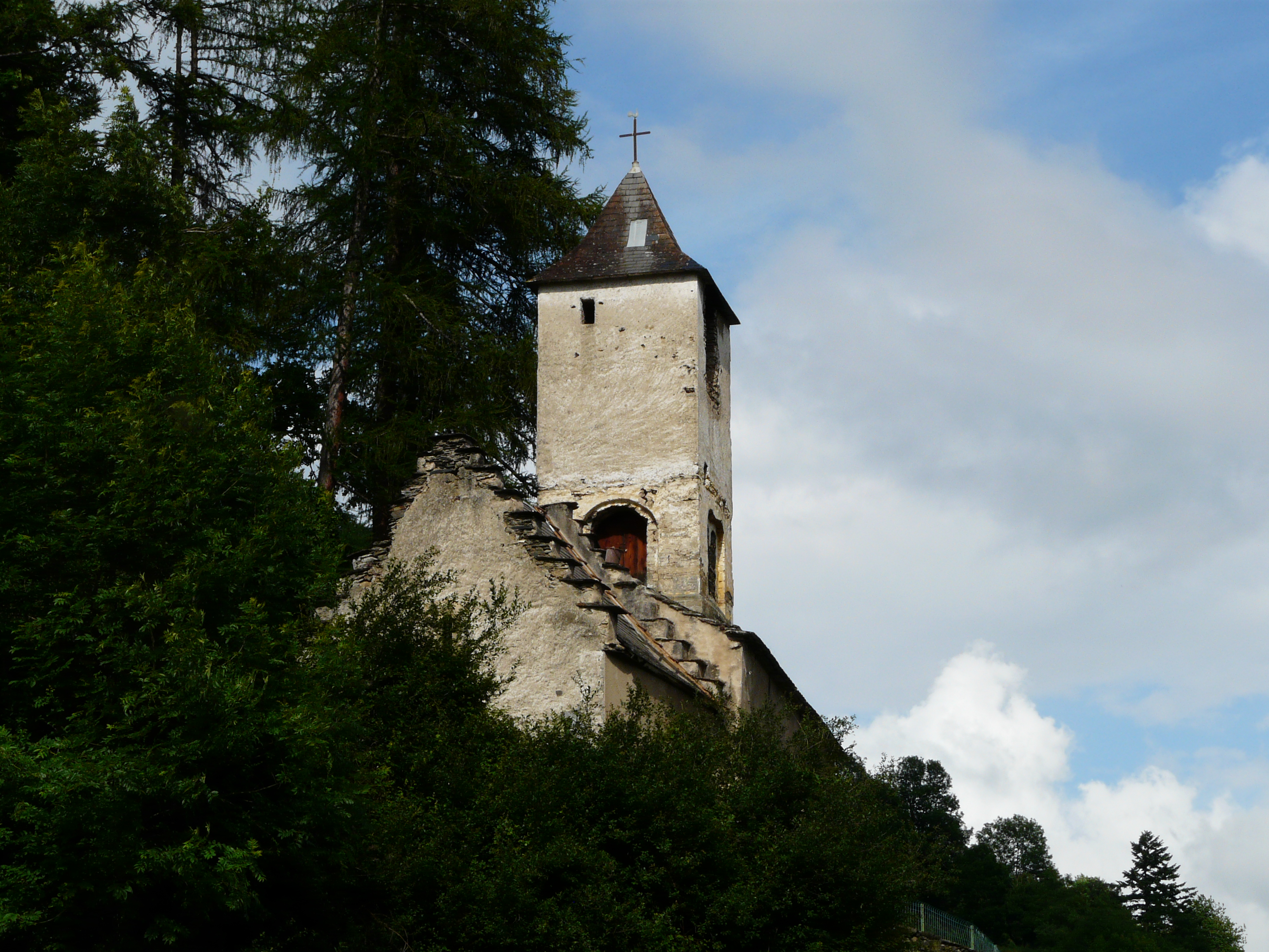 L'église Saint-Martin vue depuis l'ouest-sud-ouest, Cazaril-Laspènes, Haute-Garonne, France.